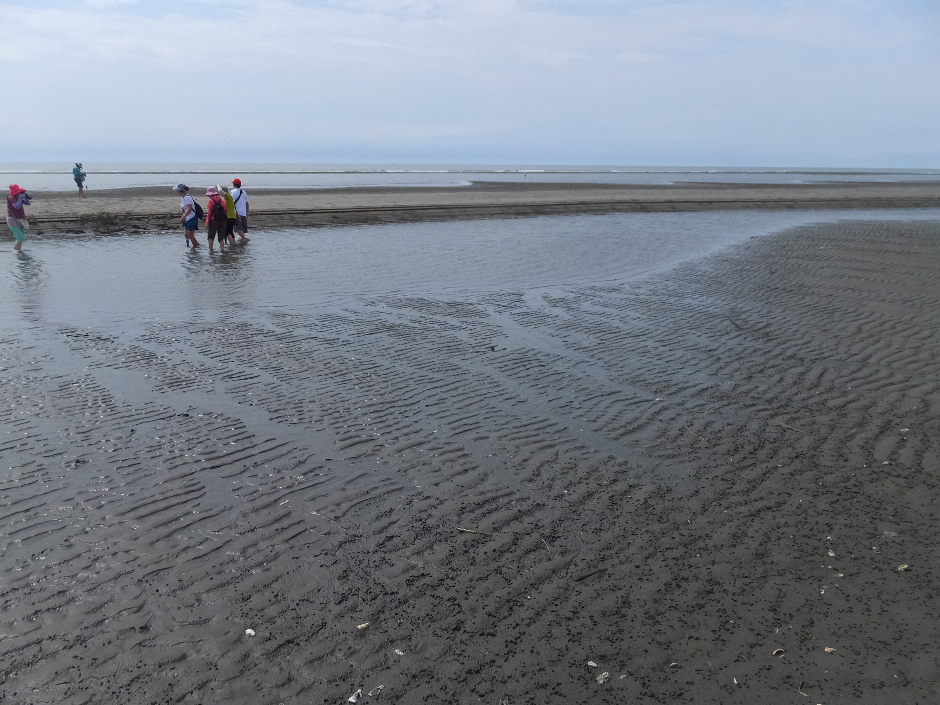 外傘頂洲 Waisanding Barrier Island